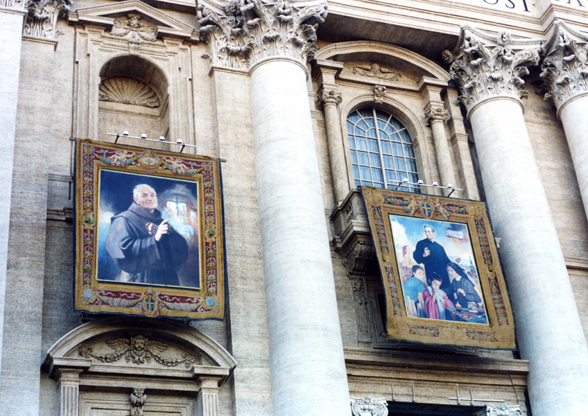 Due tele dell'artista Giuseppe Antonio Lomuscio esposte contemporaneamente sulla facciata della Basilica di S. Pietro in Vaticano